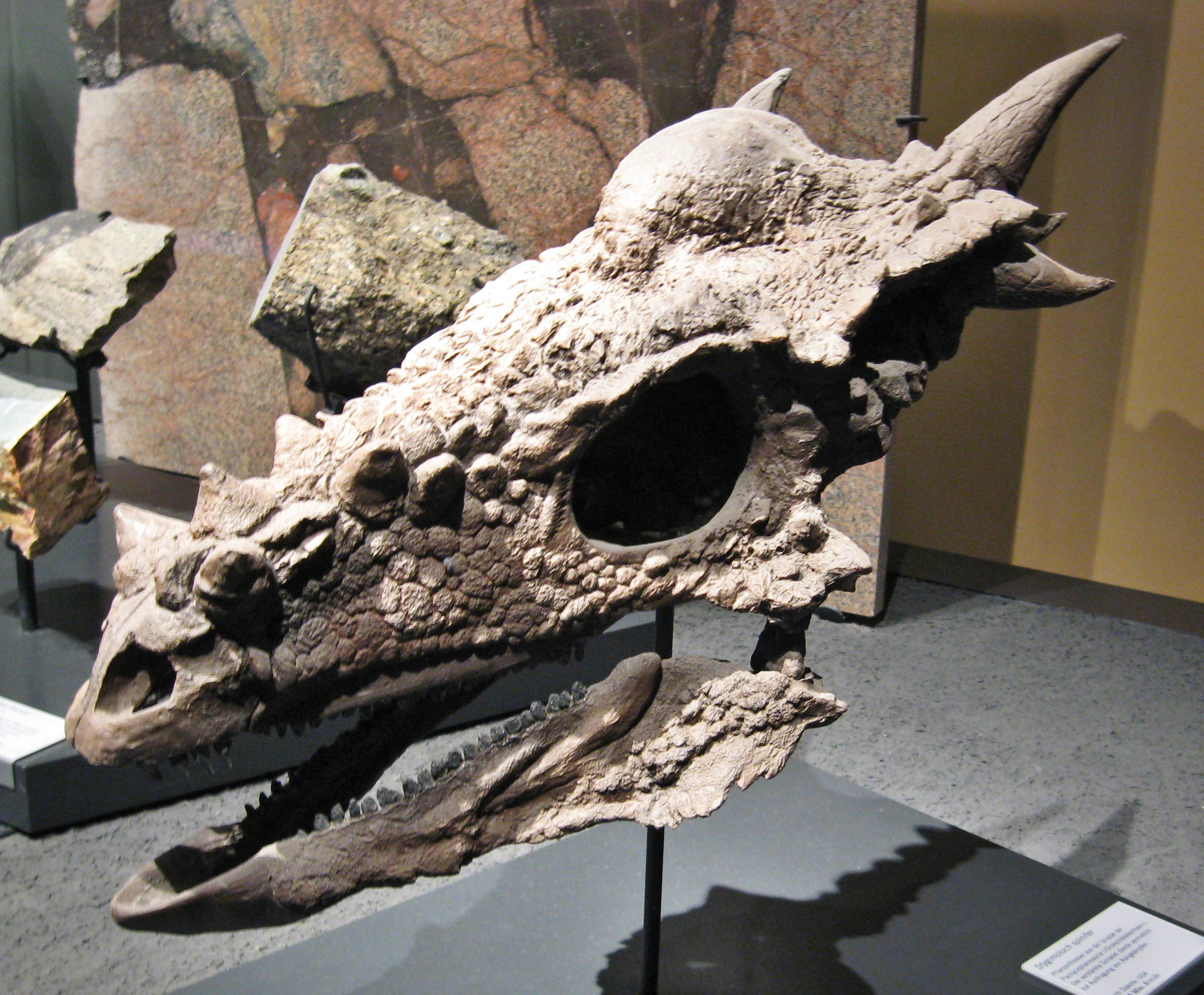 Stygimoloch spinifer, North Dakota, USA, 65 Mio. Kreide